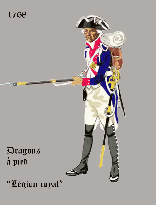 l'uniforme des dragonsà pied de la Légion royale en 1768